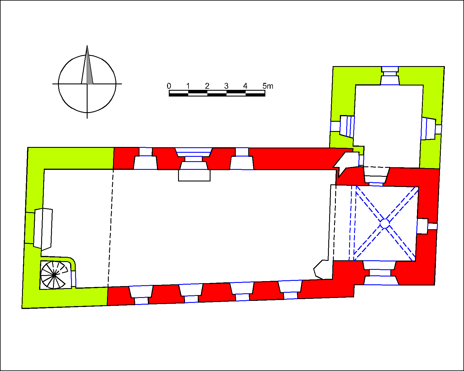 Kostel svatého Klimenta, Skalecká, Kostelní, Holešovice. Půdorys kostela.